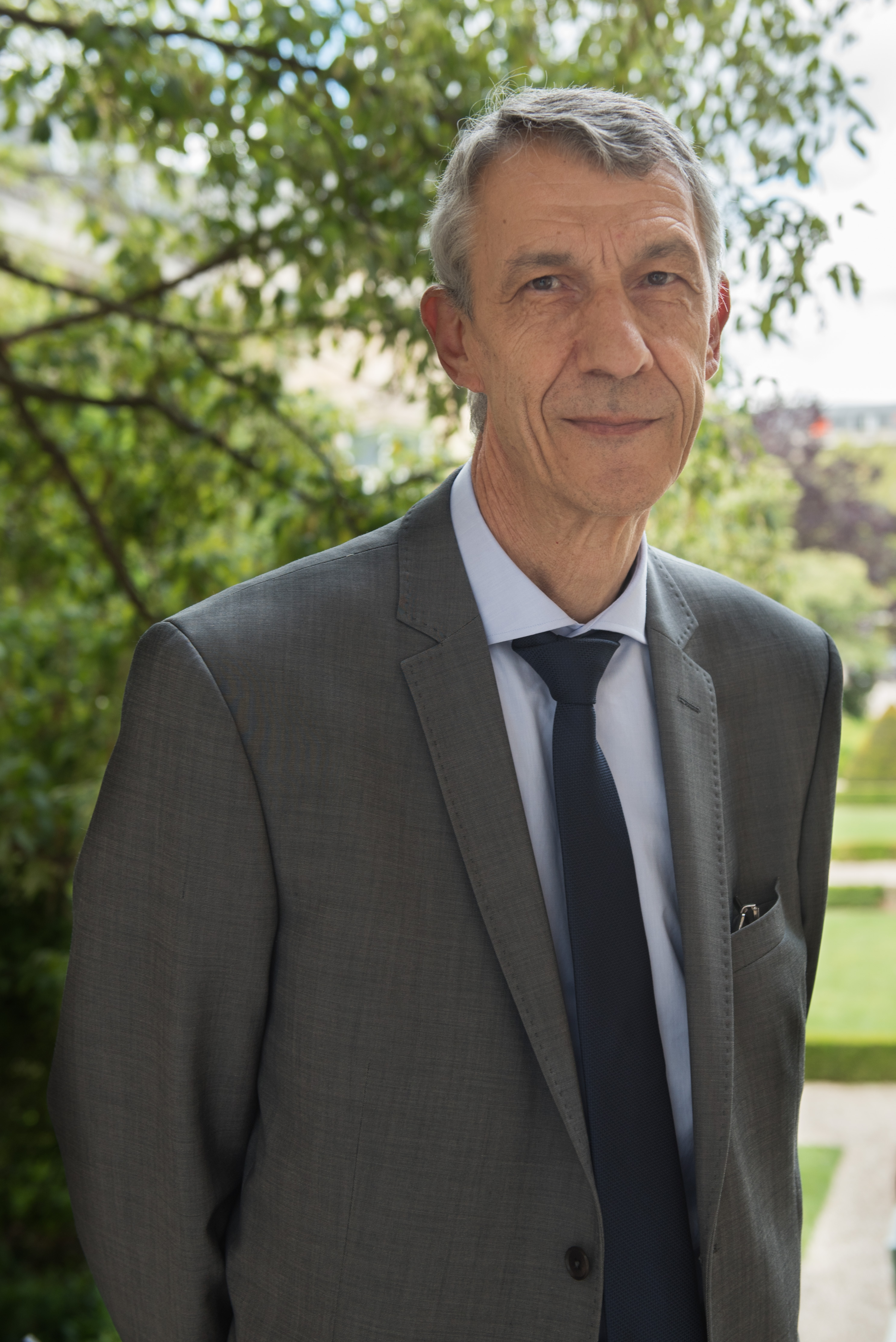 Michel Castellani dans le jardin des Quatre colonnes du palais Bourbon en 2017.